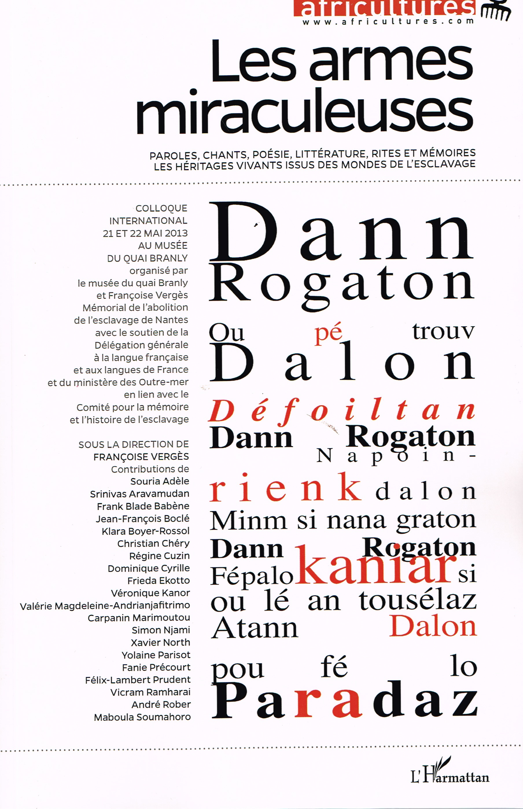 Africultures, actes du colloque des 21 et 22 mai 2012 sous la direction de Françoise Vergès au musée du quai Branly Paris : " La création est-elle une arme miraculeuse" restitution de l'intervention illustrations dans le numéro et visuel du colloque réalisé par ses soins en couverture.